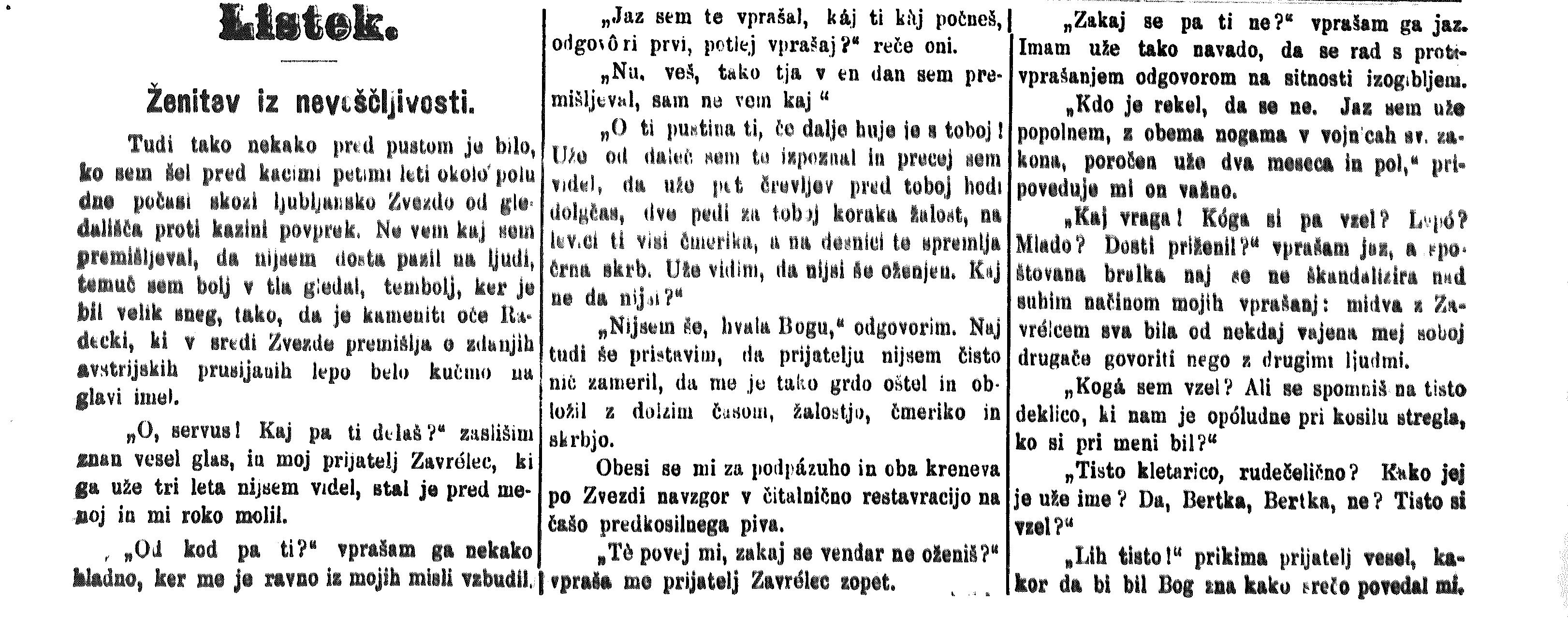 Začetek besedila Josipa Jurčiča Ženitev iz nevoščljivosti iz časopisa Slovenski narod.